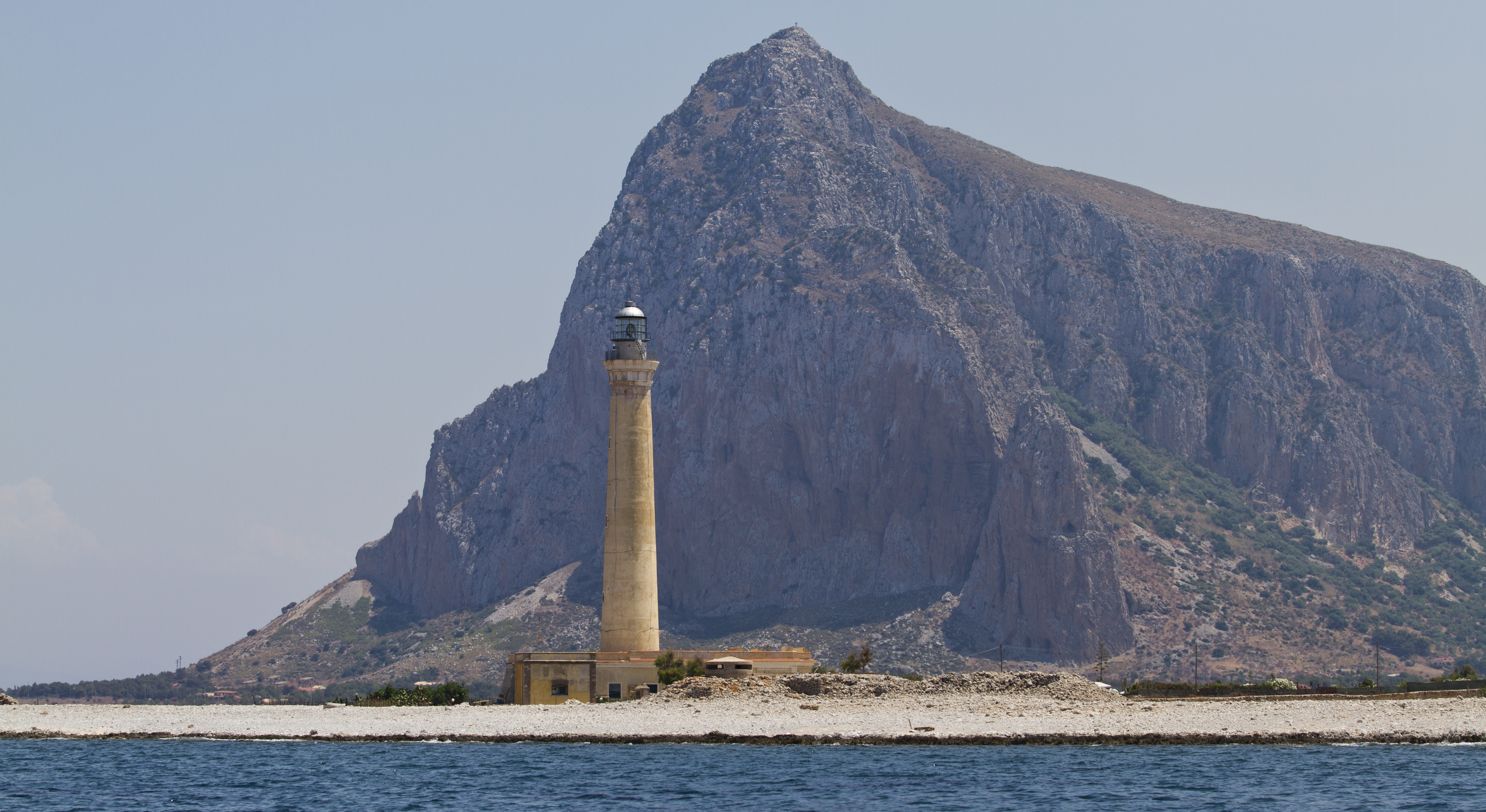 San Vito Lo Capo Faro, San Vito lo capo TP, Sicily, Italy